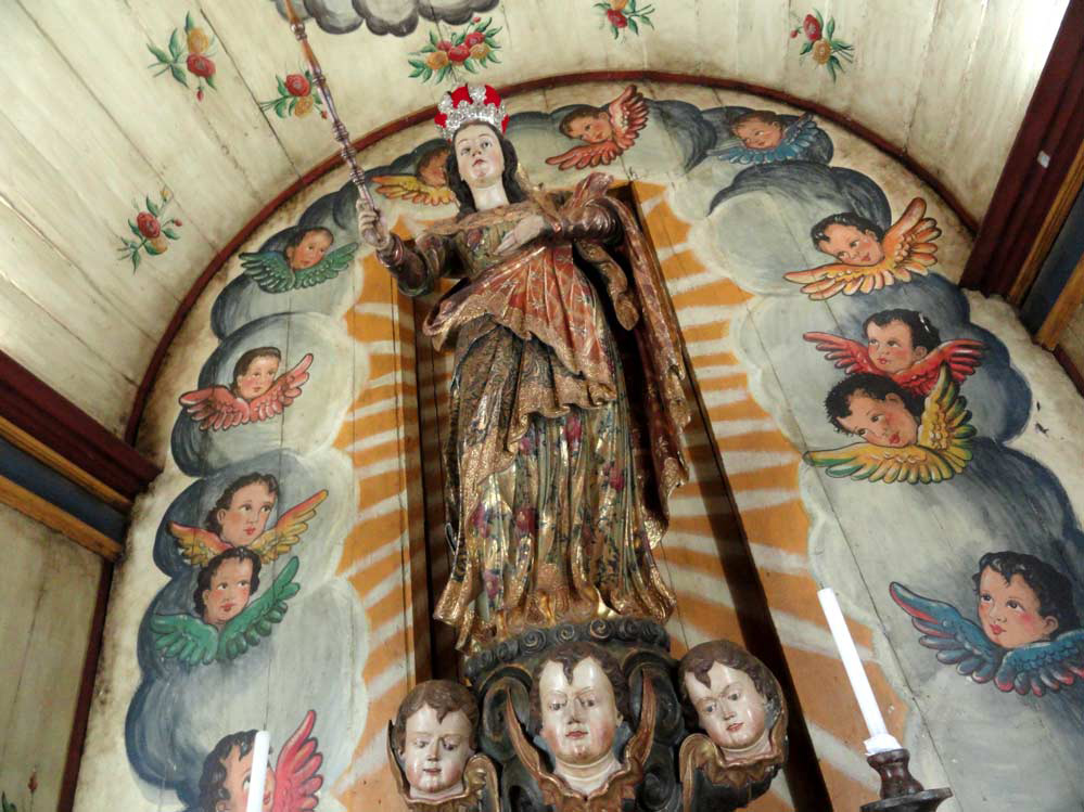 Igreja de São Francisco de Assis (Sabará)